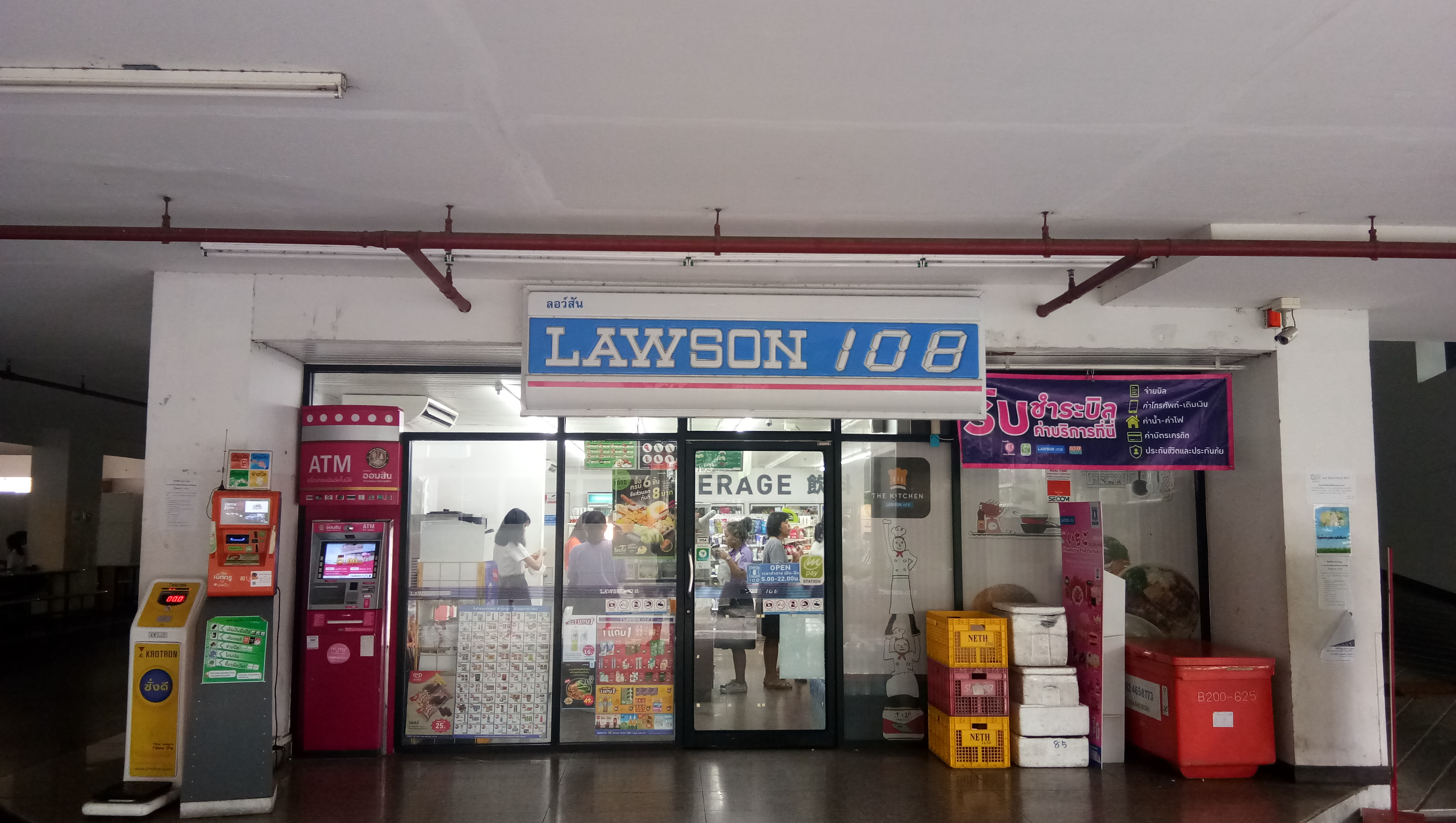 LAWSON 108 มรภ.บ้านสมเด็จฯ